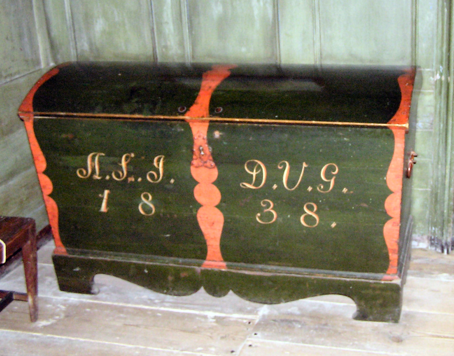 kiste på Læsøgård, Frilandsmuseet